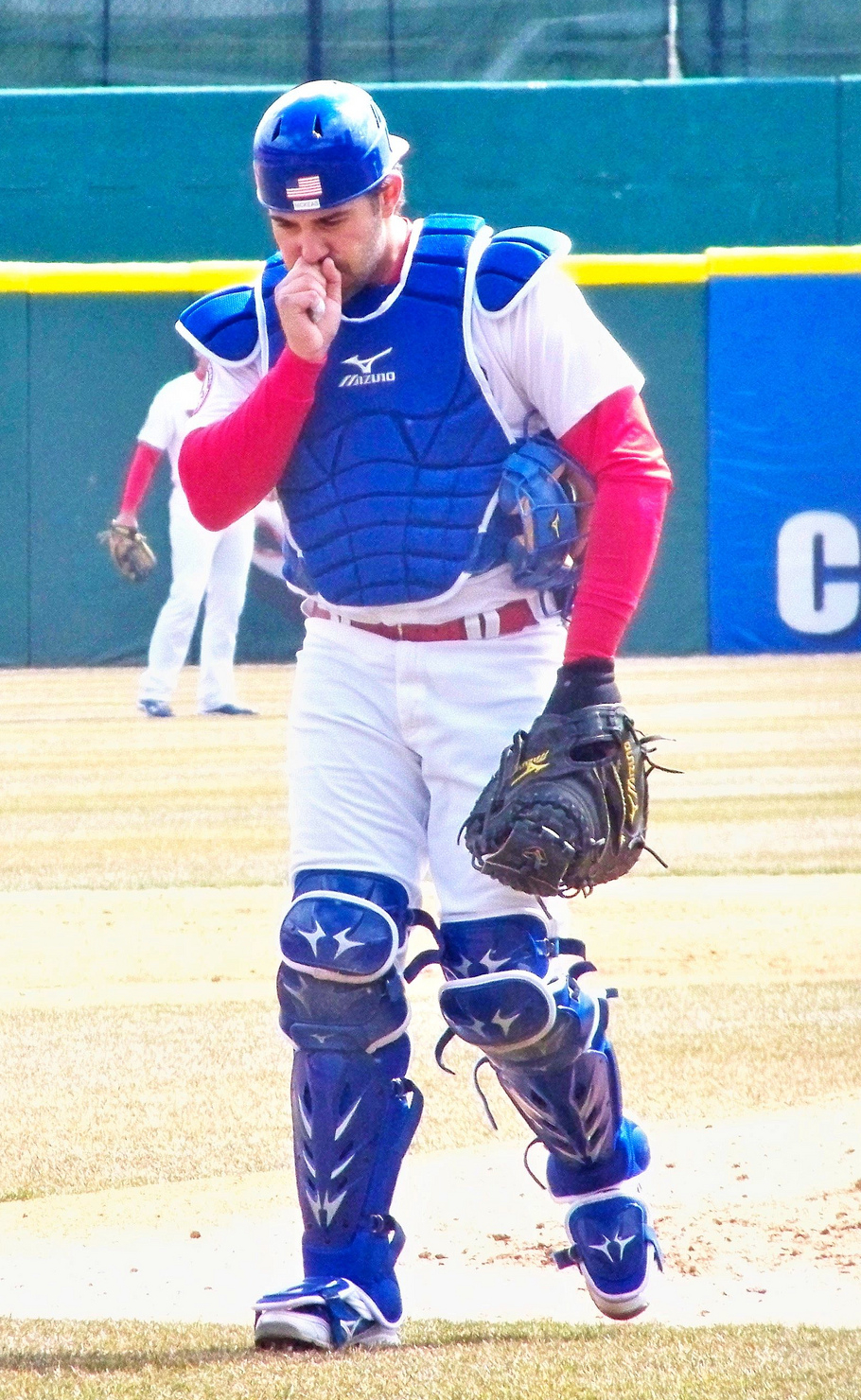 Mike Nickeas